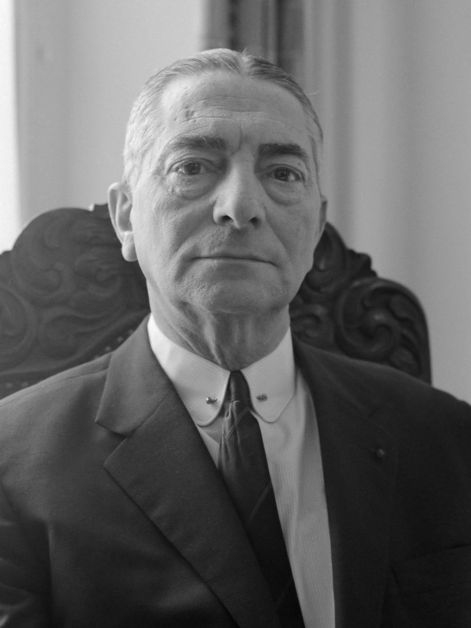 Opdracht Elsevier, Hans Boekman 13 januari 1966